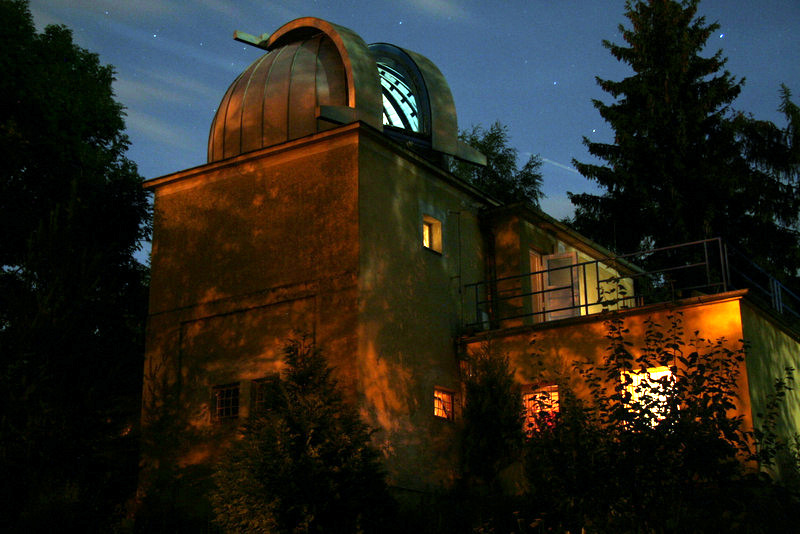 Hvezdarna v J. Hradci